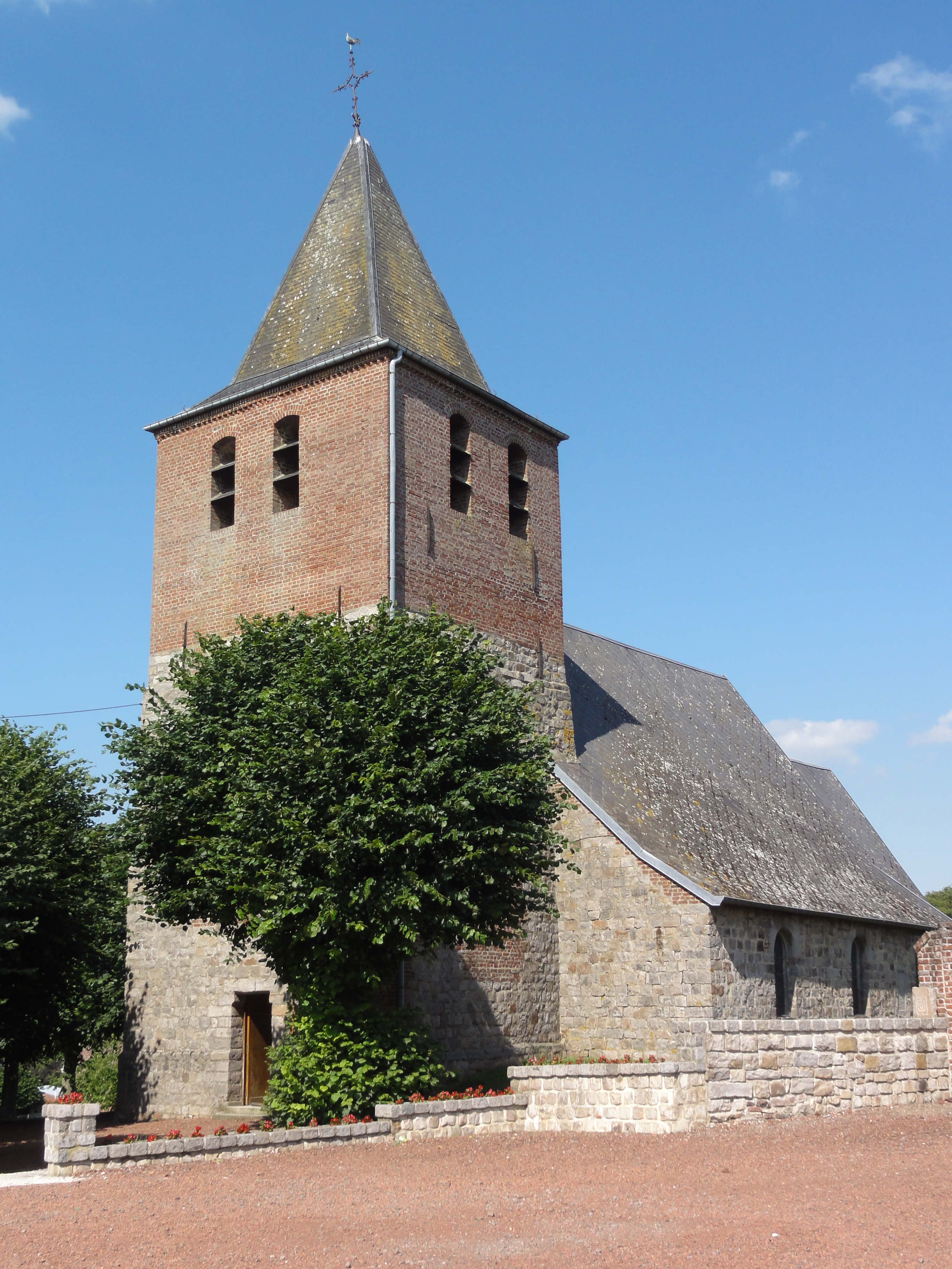 Escarmain (Nord, Fr) l'église